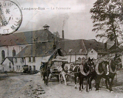 usine des Faiences et Emaux de Longwy en 1900